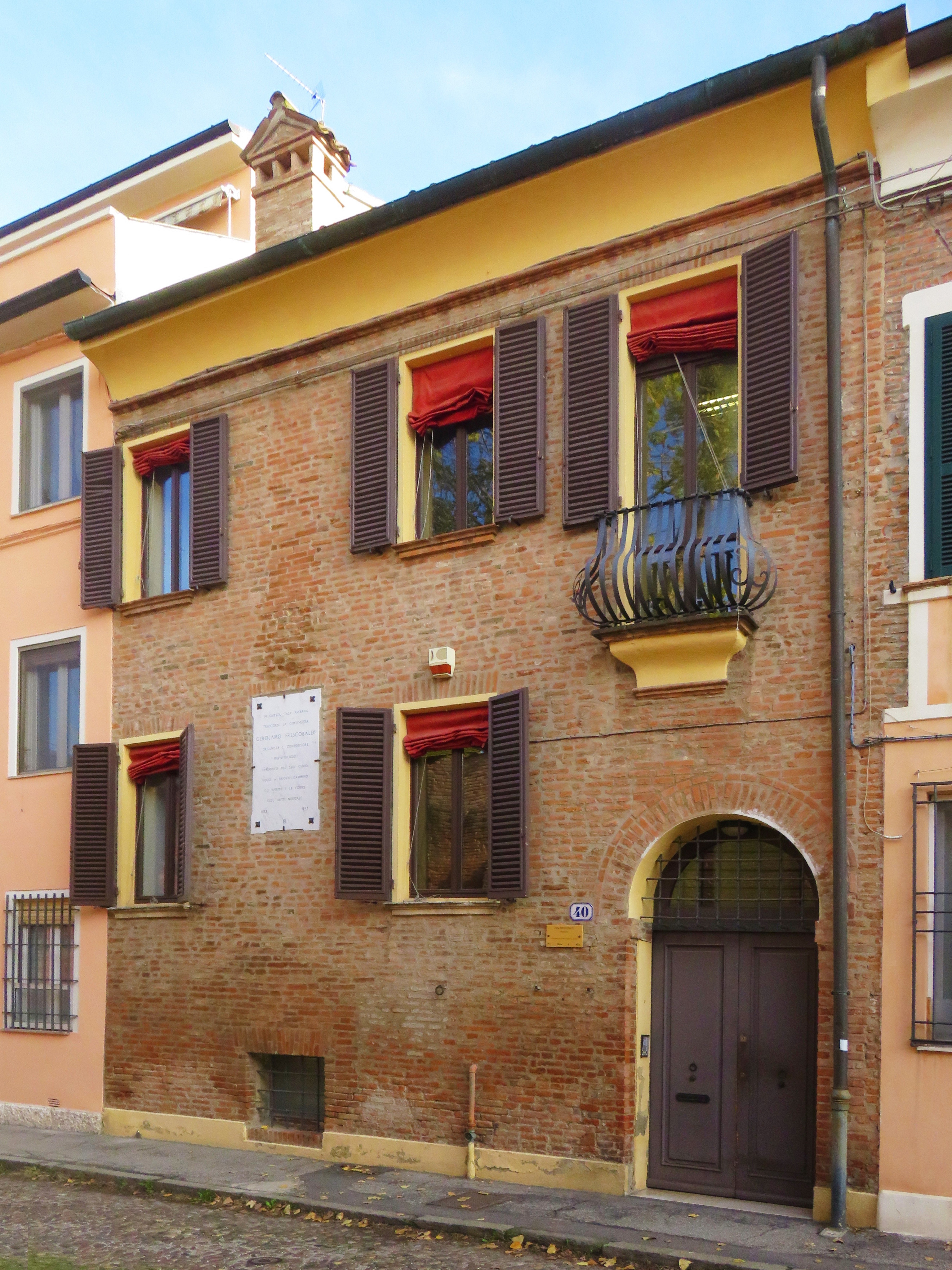 Casa dove visse Girolamo (o Gerolamo) Frescobaldi